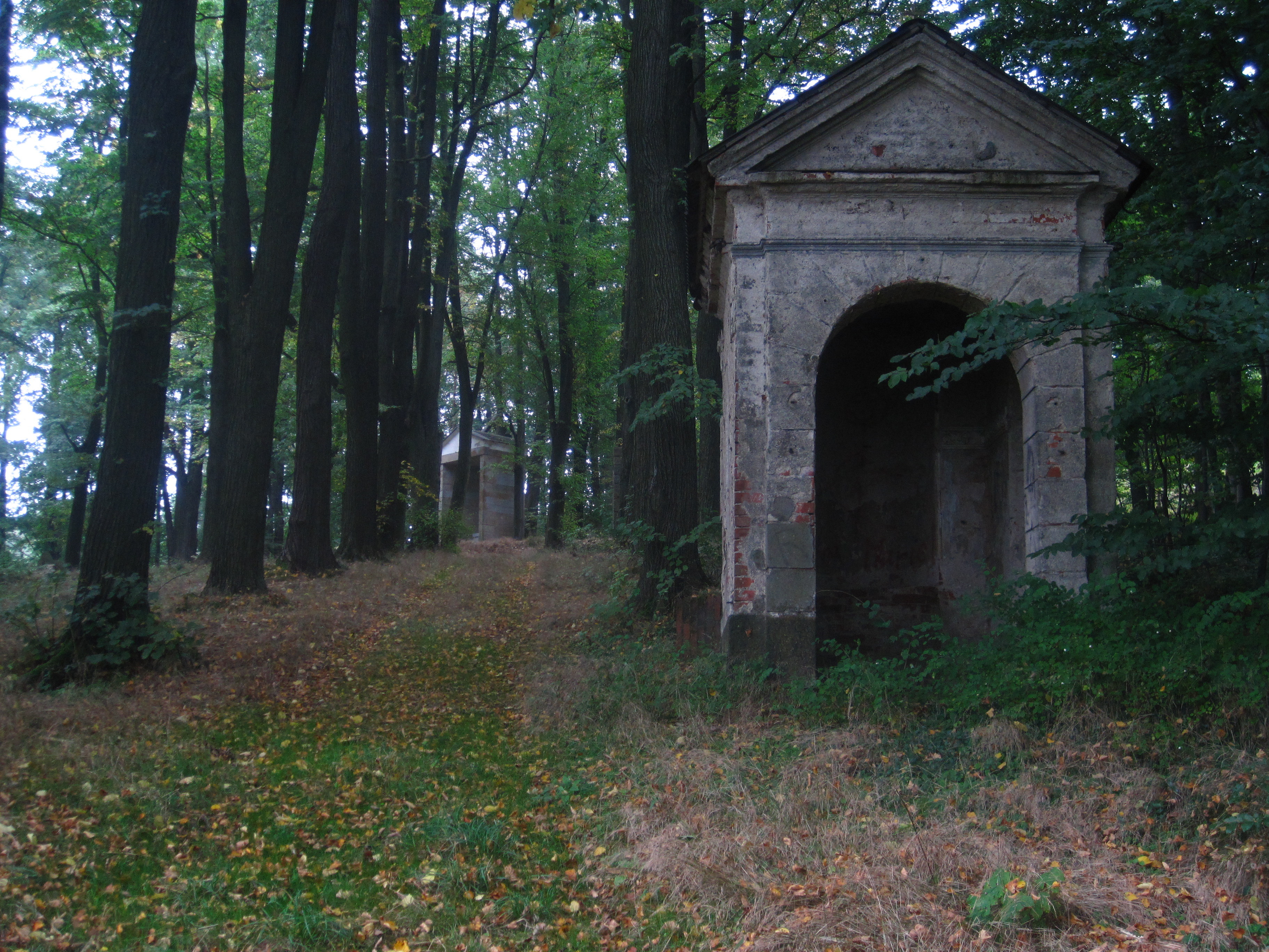 Křížová cesta, pp. 402/3, 403, 404, 435, severně od vsi při modré značce, Království (Šluknov).